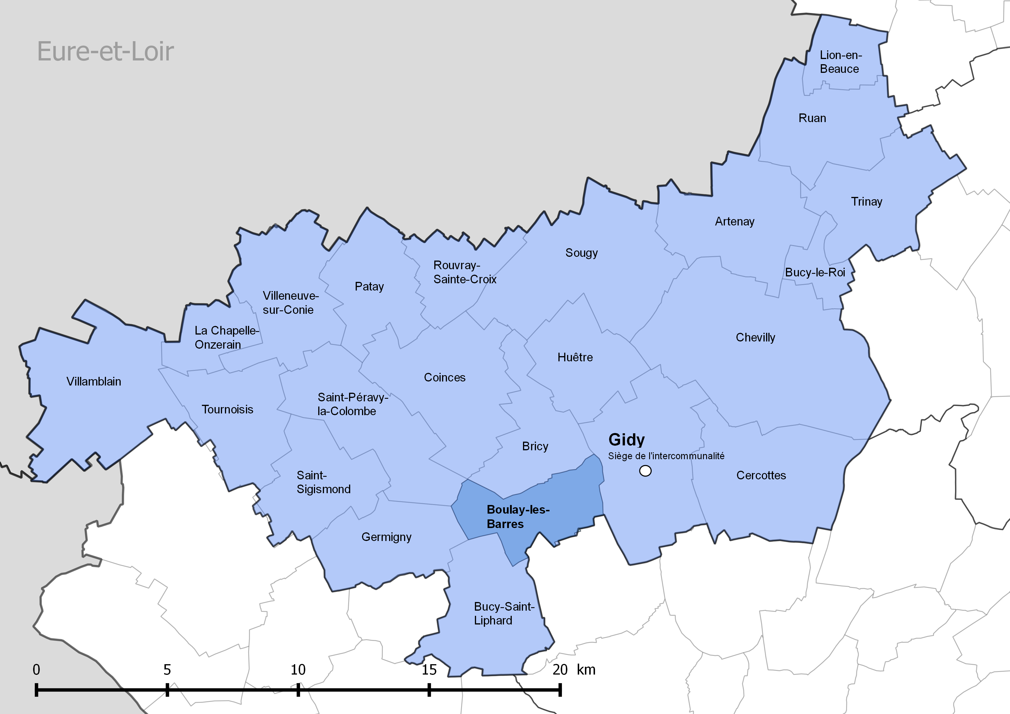 Périmètre de la communauté de communes de la Beauce loirétaine - Situation de la commune de Boulay-les-Barres